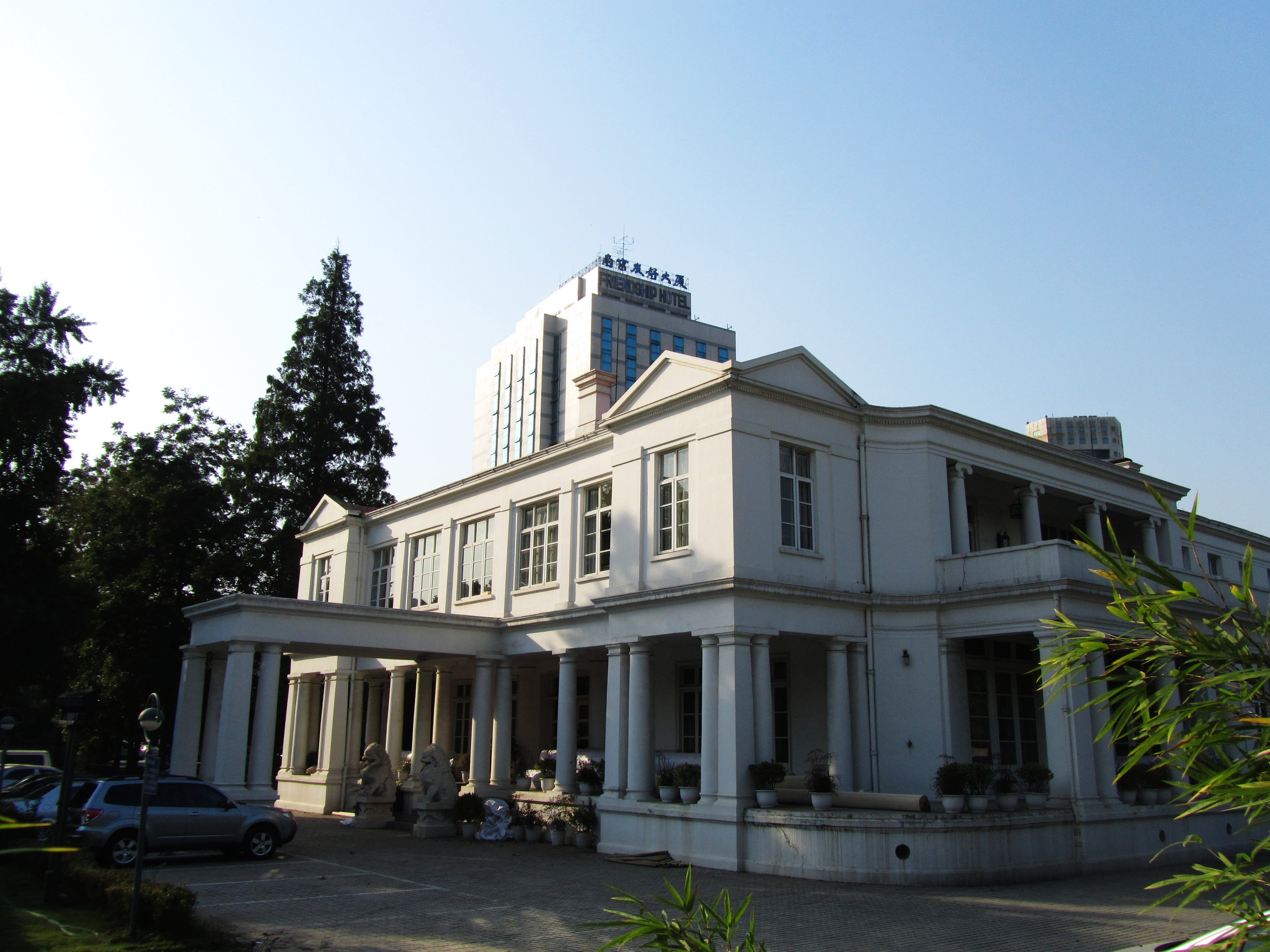 英国驻中华民国大使馆旧址，办公楼远景。